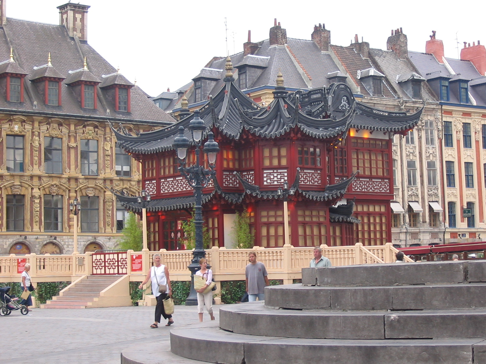 Kineski paviljon izgrađen na Grand' Place Charles-de-Gaulle u Lilleu za Lille 2004 (cijelogodišnju proslavu u Lilleu tijekom nošenja naslova Europskog glavnog grada kulture za 2004. godinu